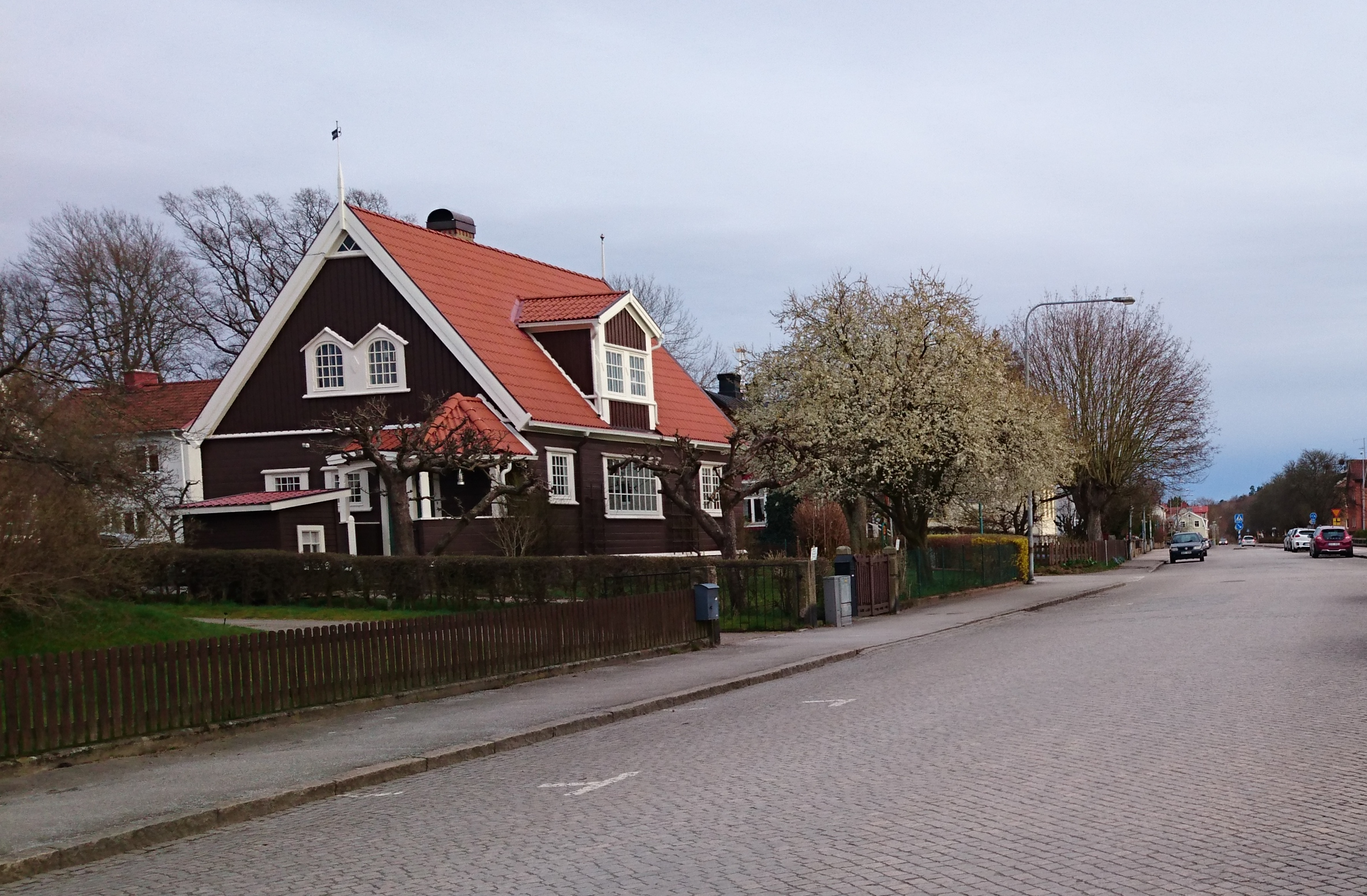 Överbanmästare Johanssons första villa 2017.